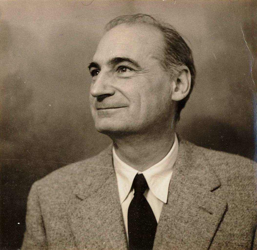 Marius Schneider - Collection privée